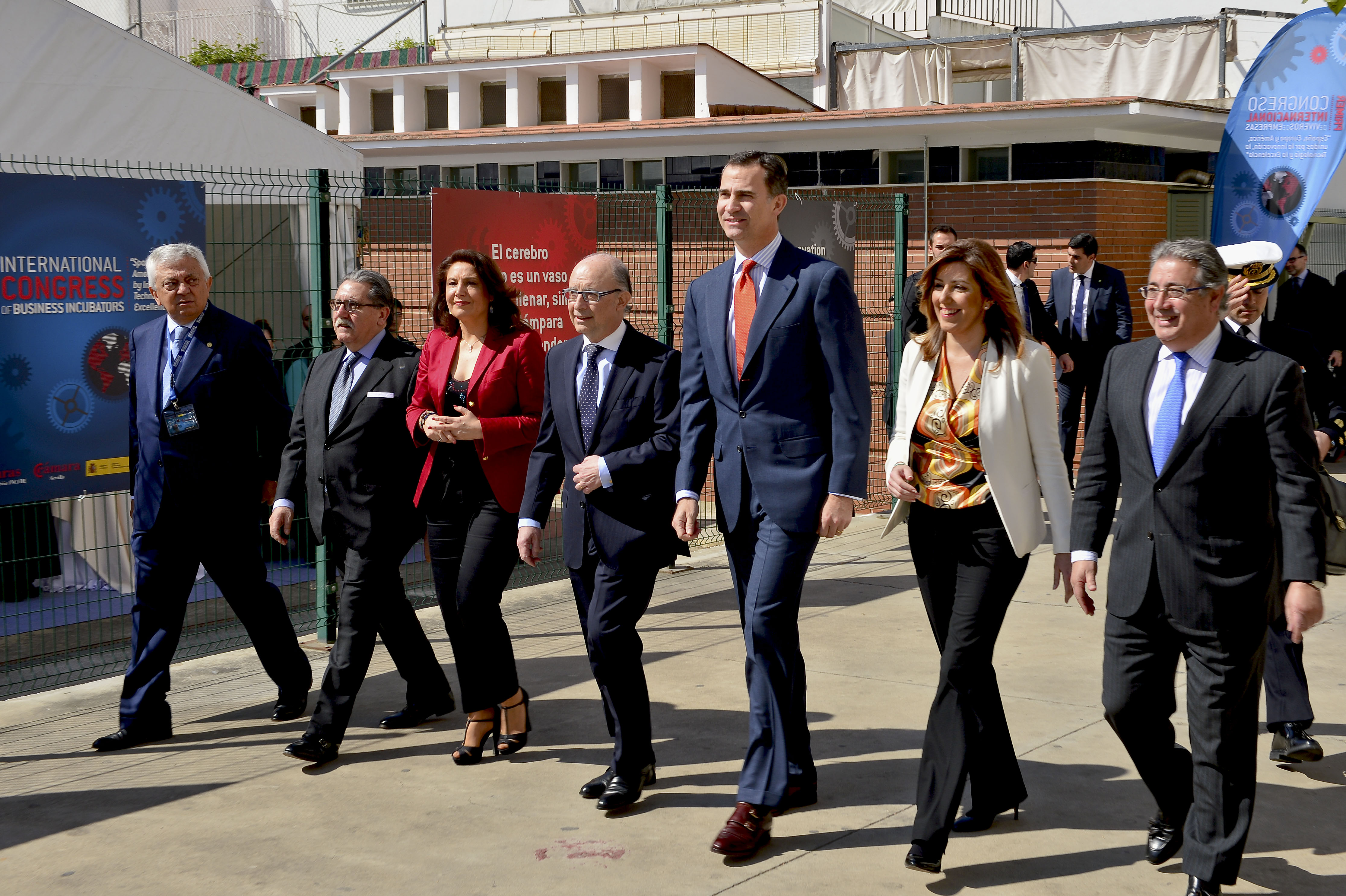 El Príncipe Felipe participó en la inauguración deI Congreso de Viveros de Empresas de Sevilla titulado "España, Europa y América, unidas por la Innovación, la Tecnología y la Excelencia". A la izquierda del príncipe se encuentra el Ministro Montoro y a su derecha la presidenta de la Junta de Andalucía Susana Díaz y el alcalde de la ciudad, Juan Ignacio Zoido